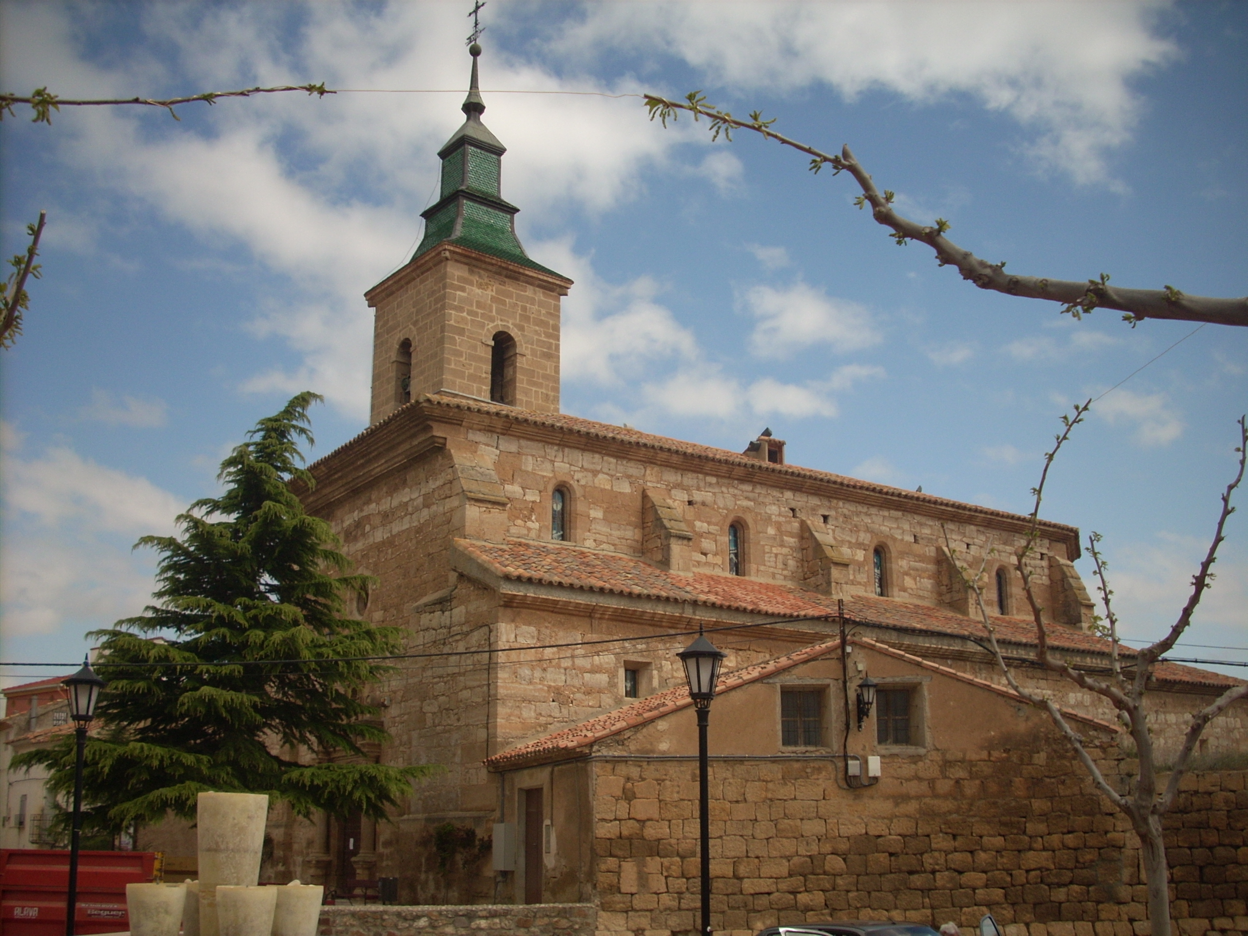 Iglesia Parroquial de Fuentes Claras (Teruel)